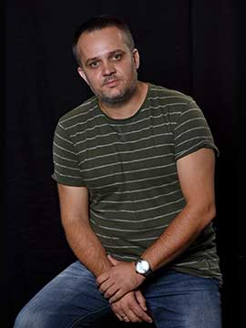 Милош Крстовић